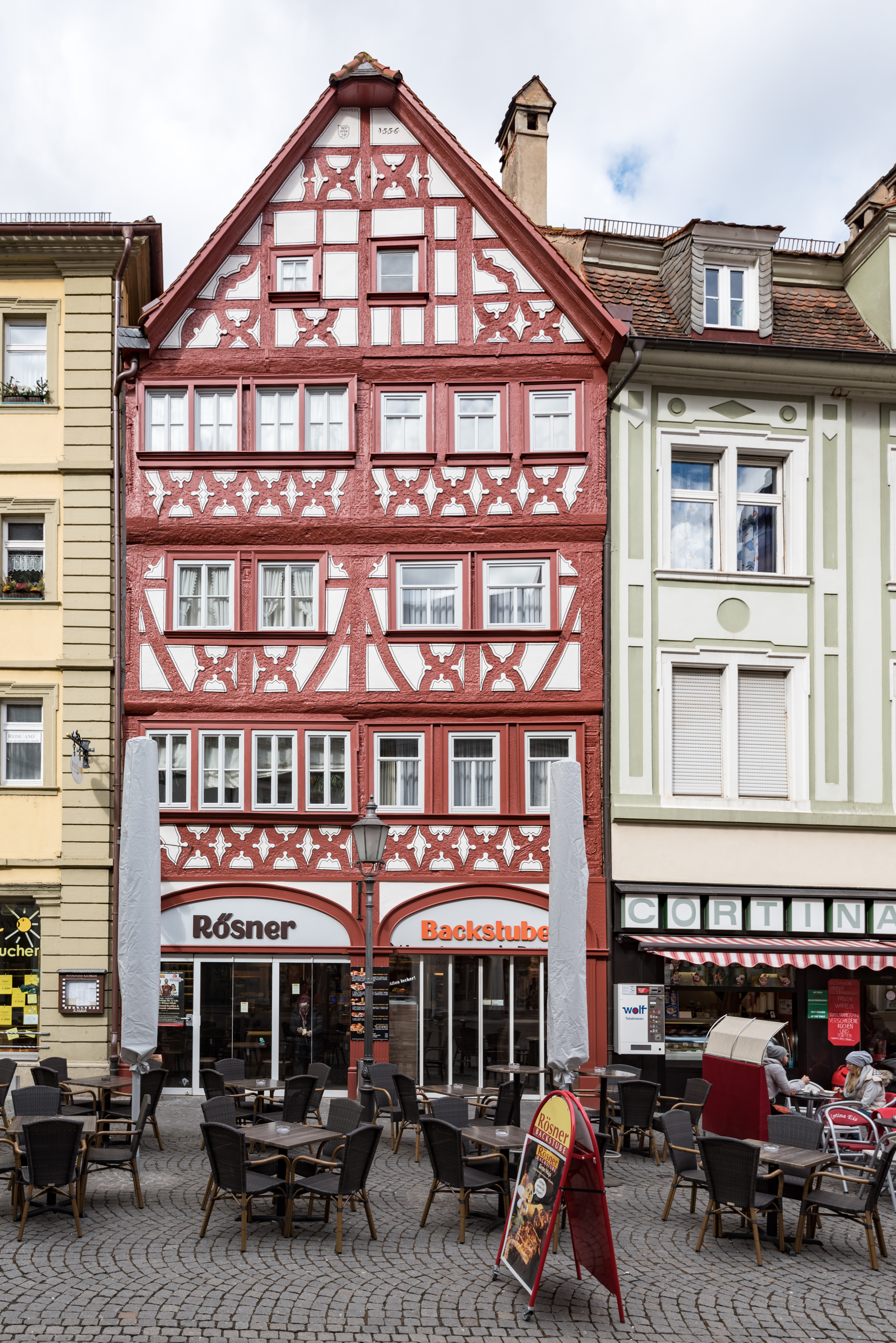 Kitzingen, Marktstraße 26, 24